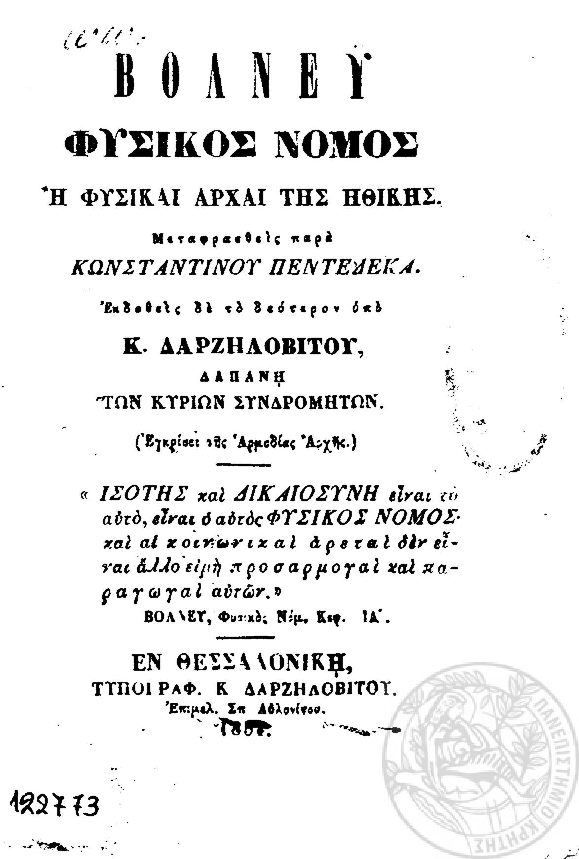 Βόλνεϋ, Φυσικός Νόμος ή φυσικαί αρχαί της ηθικής. Μεταφρασθείς παρά Κωνσταντίνου Πεντεδέκα. Εκδοθείς δε το δεύτερον υπό Κ. Δαρζηλοβίτου, δαπάνη των Κυρίων συνδρομητών. (Εγκρίσει της Αρμοδίας Αρχής). - «Ισότης… παραγωγαί αυτών». Βόλνεϋ, Φυσικός Νόμ. Κεφ. ΙΑ -Εν Θεσσαλονίκη, Τυπογραφ. Κ. Δαρζηλοβίτου. Επιμέλ. Σπ. Αυλονίτου. 1854. Σχ. 16ο , σ. 93 + 2 ά.α.